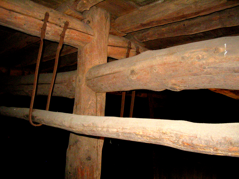 Tannerie Kalpers (Malmedy) : perche (en wallon : halta) sur laquelle les peaux étaient suspendues